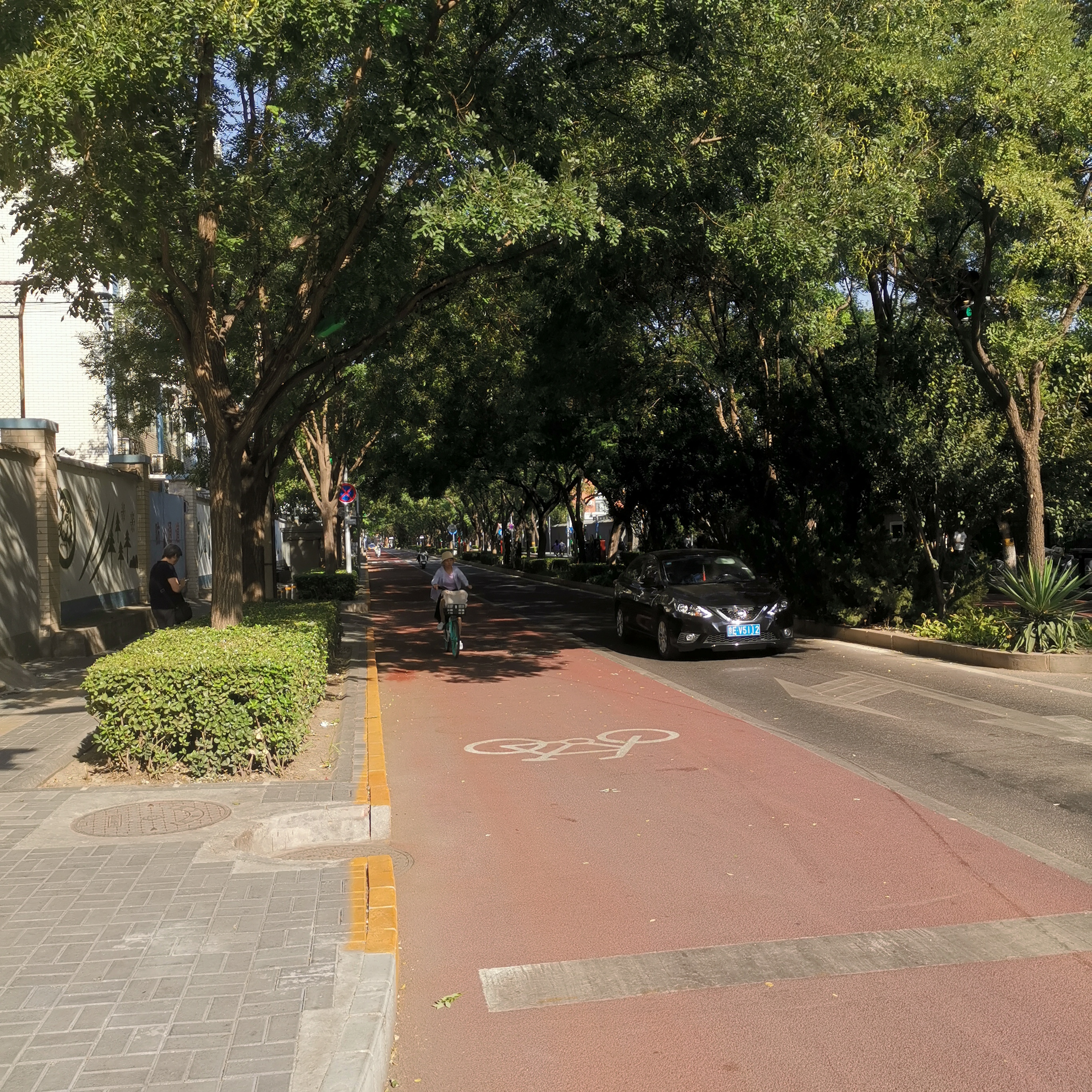 中文（中国大陆）: 槐柏树街